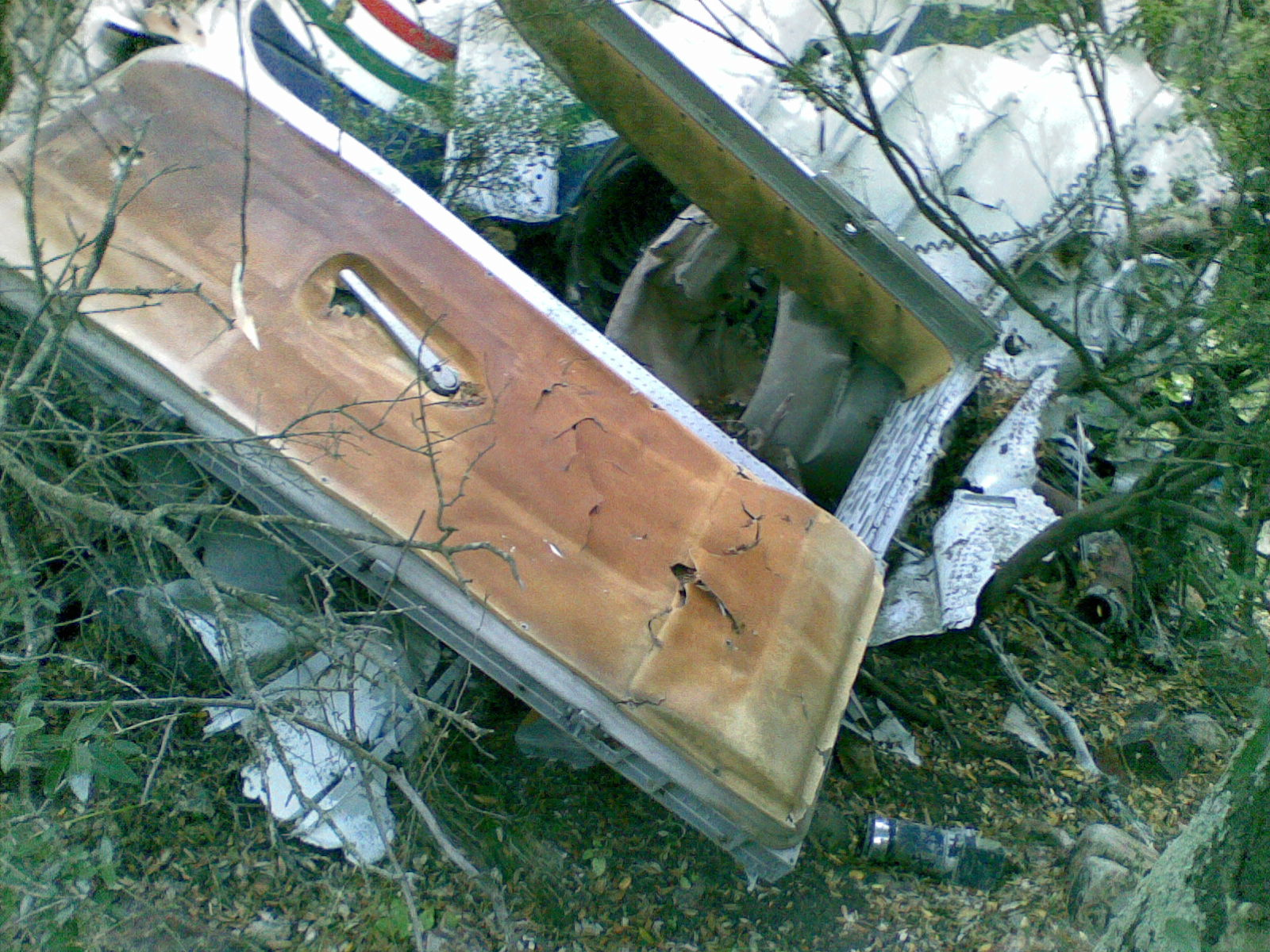 Portellone dell'aereo ATI BM-PT 012 precipitato il 15 settembre 1979 nei monti di Capoterra (CA)